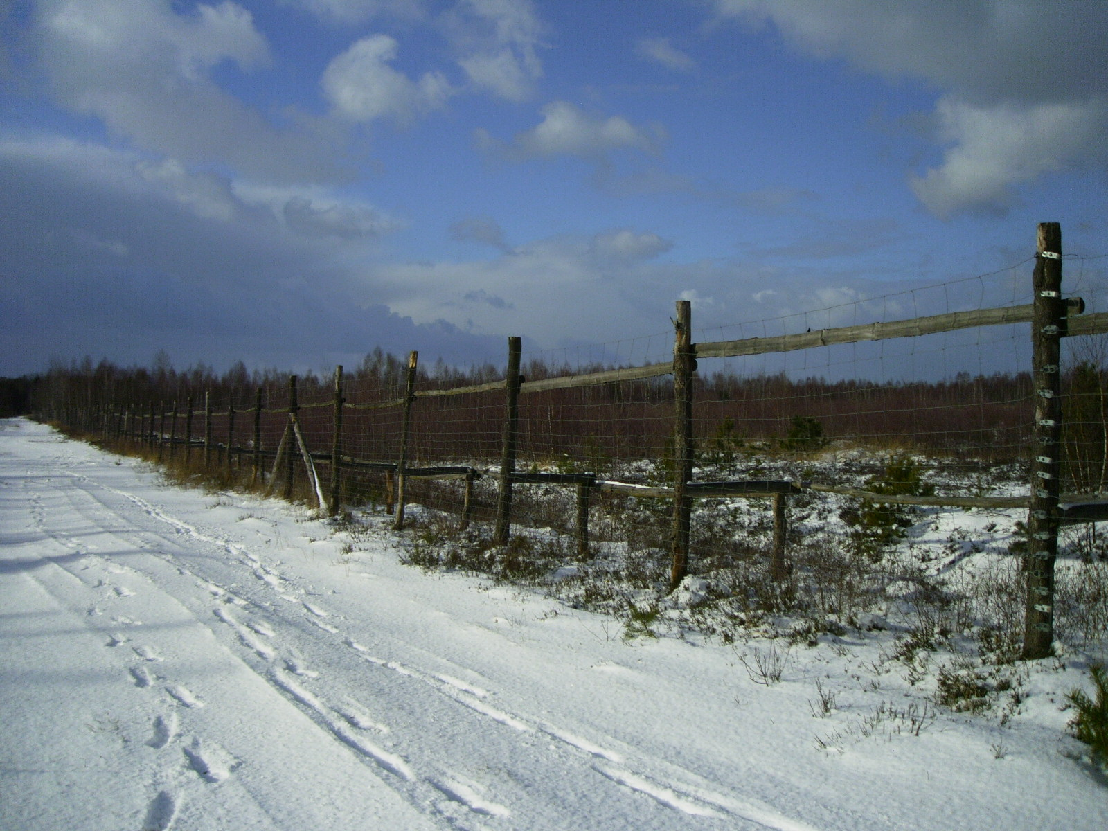 Umzäunung des 180 ha großen Elchgeheges bei Dauban, Landkreis Görlitz, Sachsen.